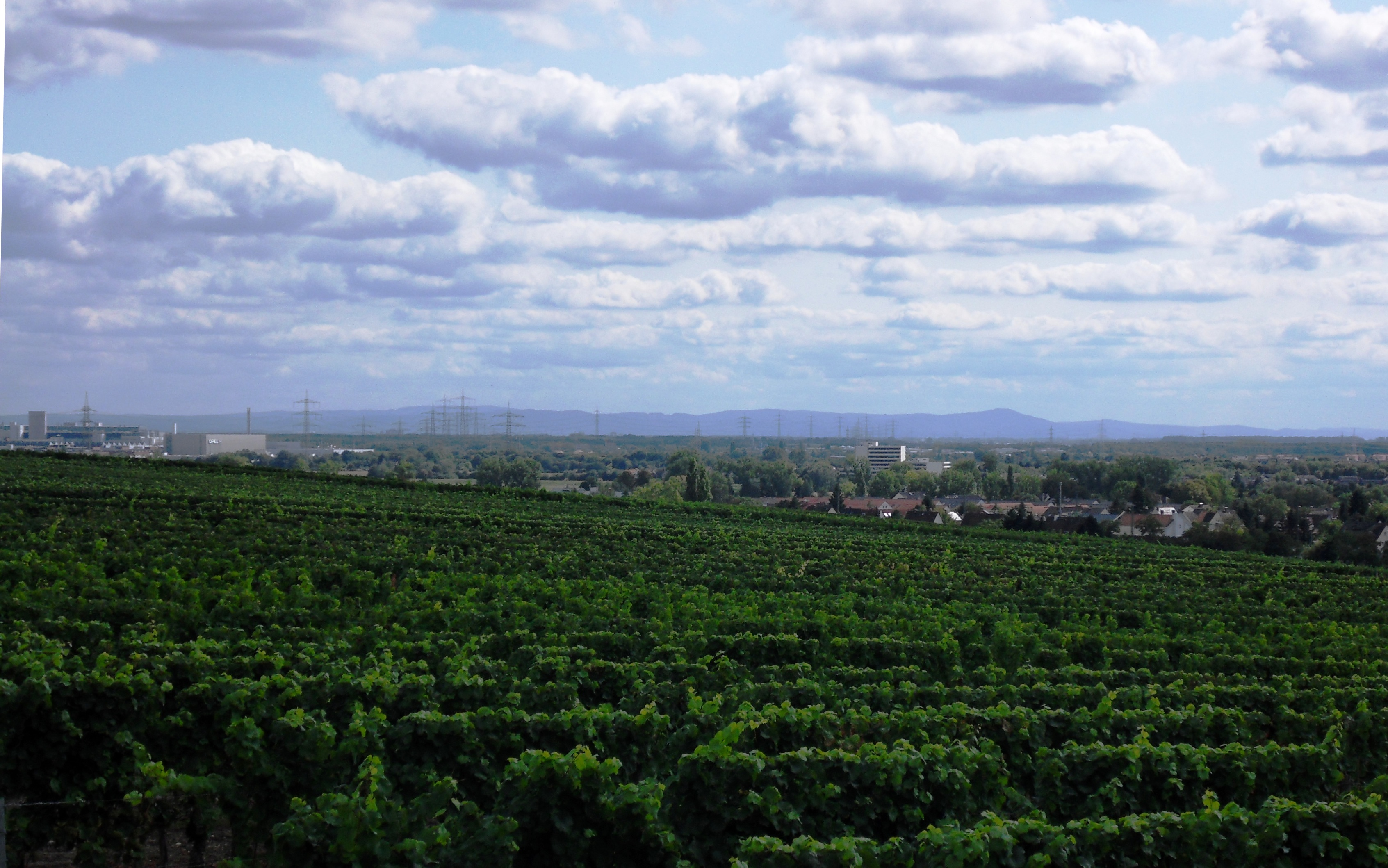 Blick über die Weinlage Hochheimer Stielweg nach Süden über die Oberrheinische Tiefebene bis zum Odenwald. Die markanteste Erhebung der Odenwald-Silhouette ist im rechten Bilddrittel der Melibokus an der Bergstraße in 38 km Entfernung. Rechts vom Melibokus setzt sich die Bergstraße nach Süden weiter fort. Am linken Bildrand sieht man Teile des Rüsselsheimer Opelwerkes.